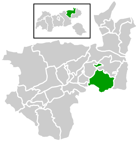 Lage der Gemeinde innerhalb des Bezirks Kufstein